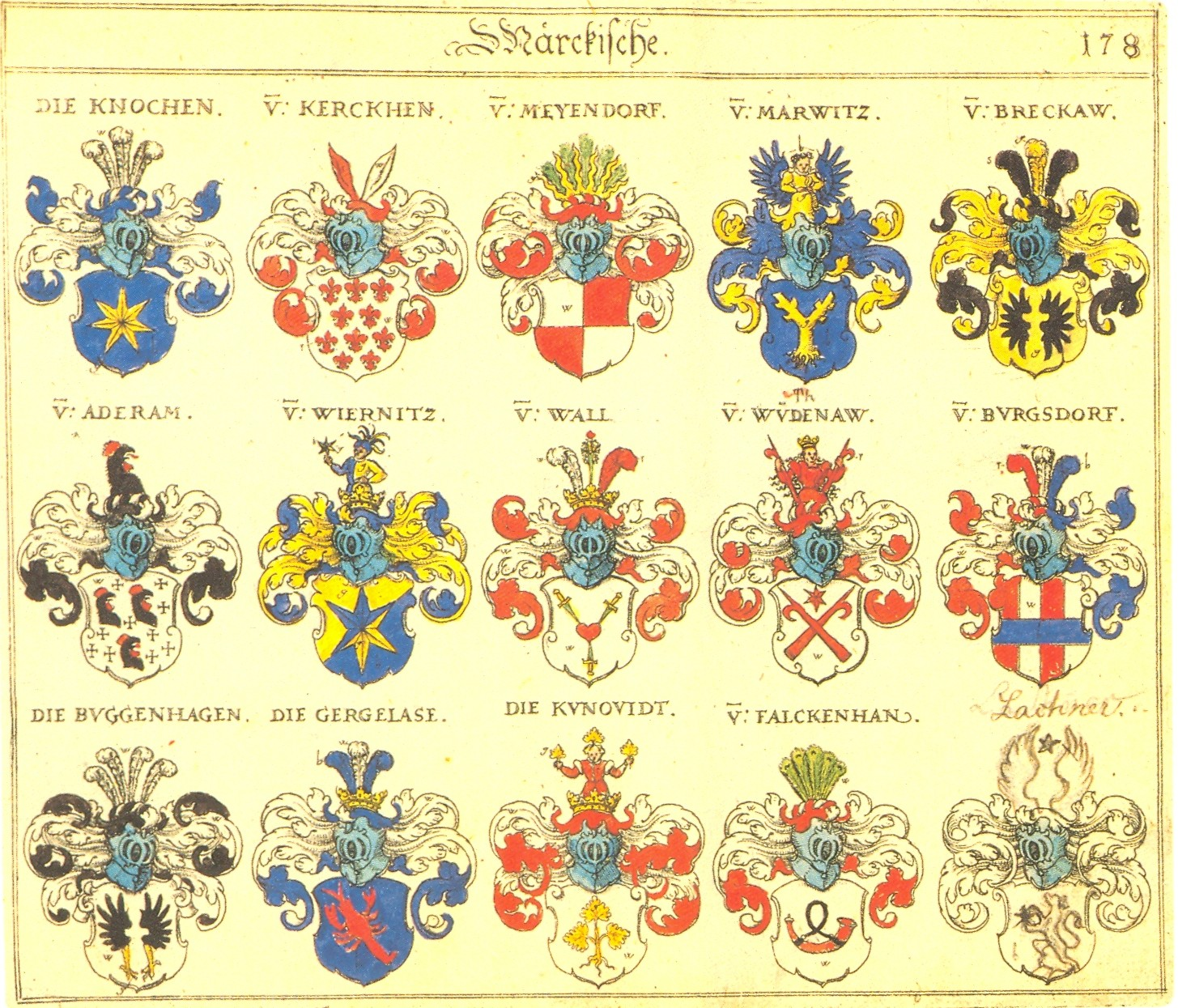 Johann Siebmacher: New Wappenbuch eingescannt aus: Horst Appuhn (Hrsg.), Johann Siebmachers Wappenbuch. Die bibliophilen Taschenbücher 538, 2. verb. Aufl , Dortmund 1989 Brandenburger Blatt 178